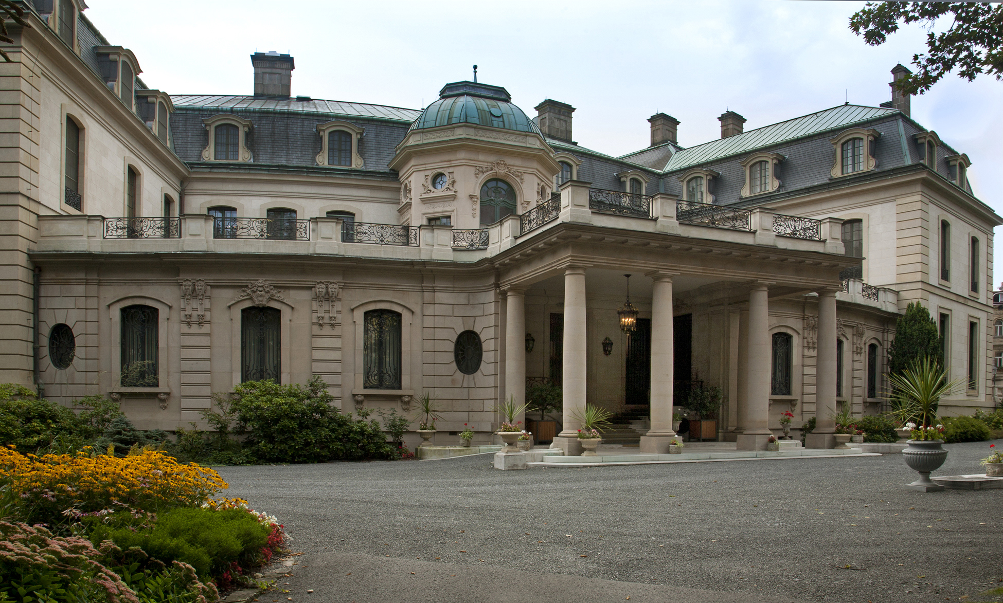 Pohled na rezidenci z ulice Ronalda Reagana. Reprezentační vilu v Praze-Bubenči nechal postavil v letech 1924-30 Otto Petschek, člen prvorepublikové bankéřské rodiny.